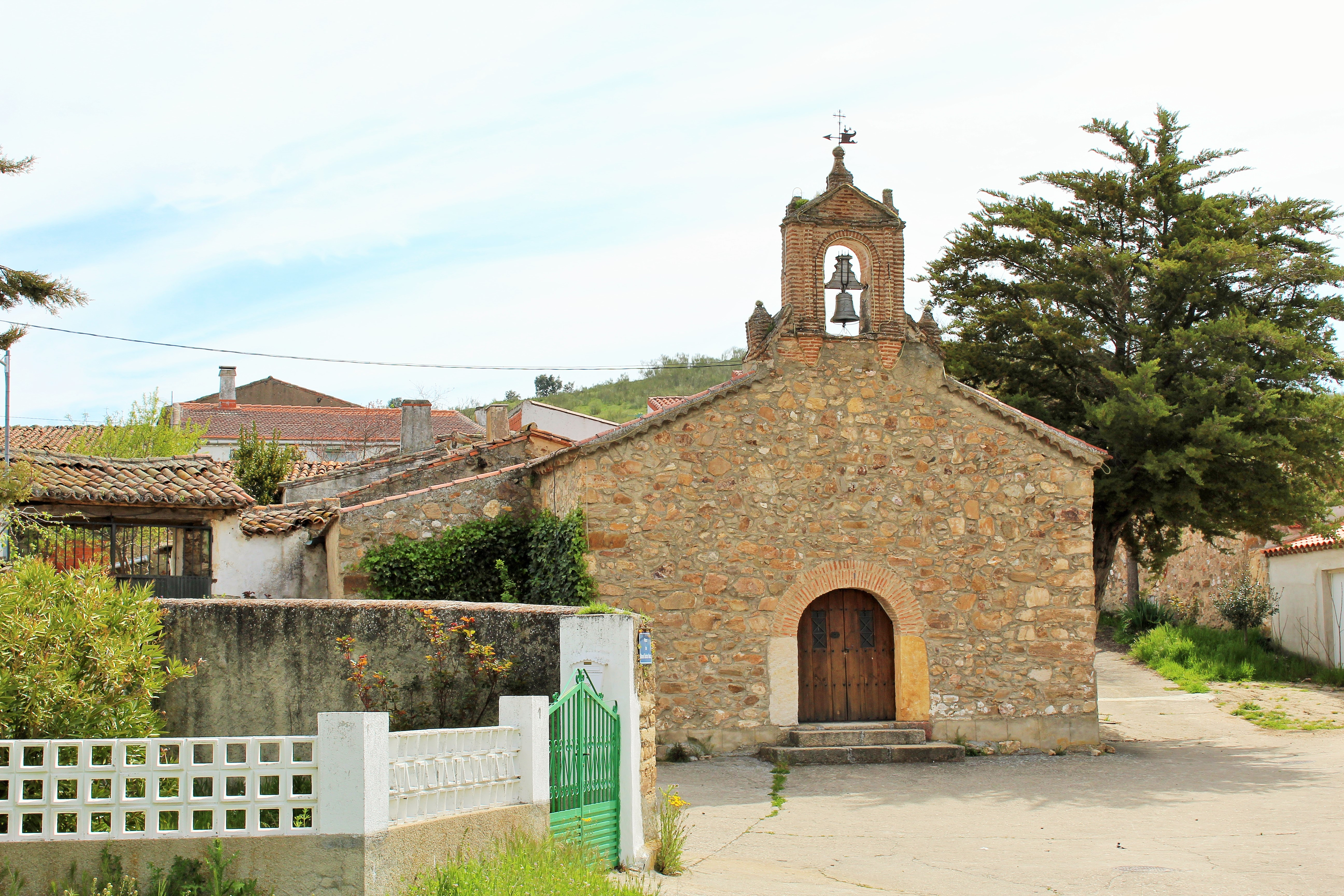 Iglesia parroquial de Beleña